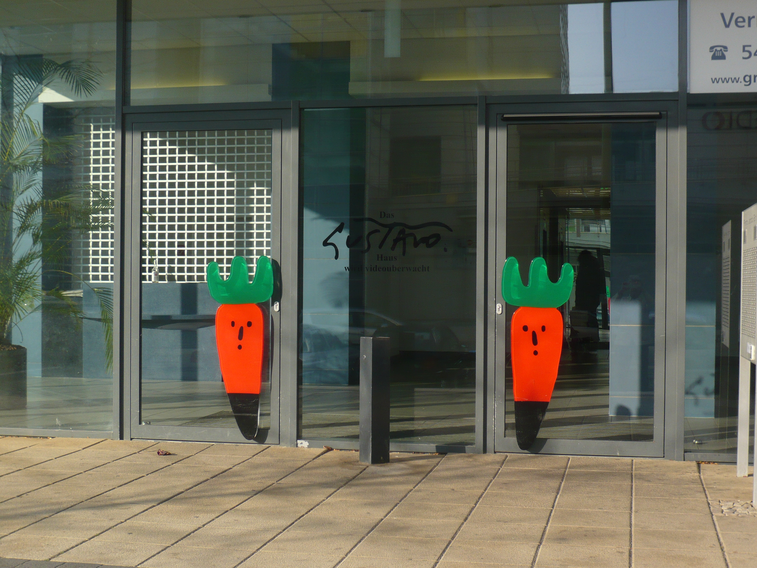 Gustavohaus im Bezirk Lichtenberg